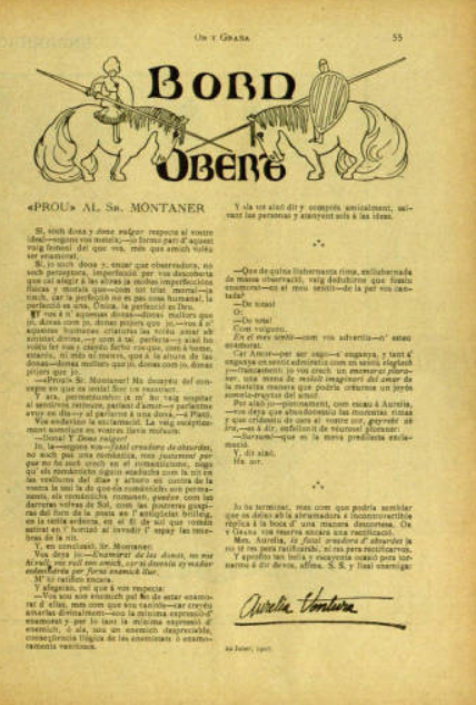 pàgina de discussió d'or y grana